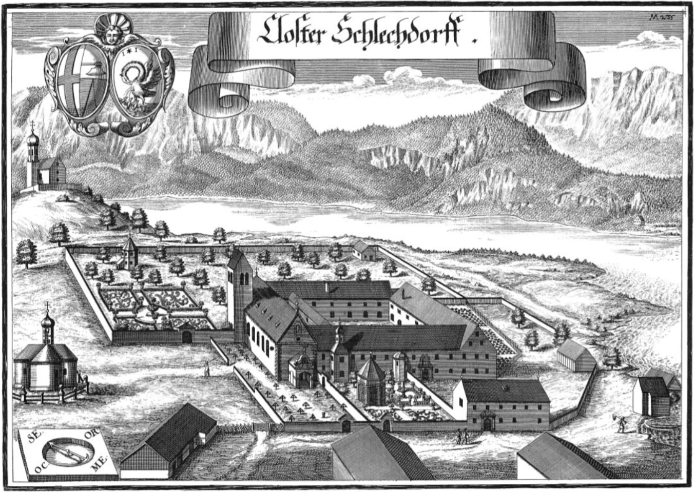 Stich von Michael Wening: Augustiner-Chorherrenstift Schlehdorf